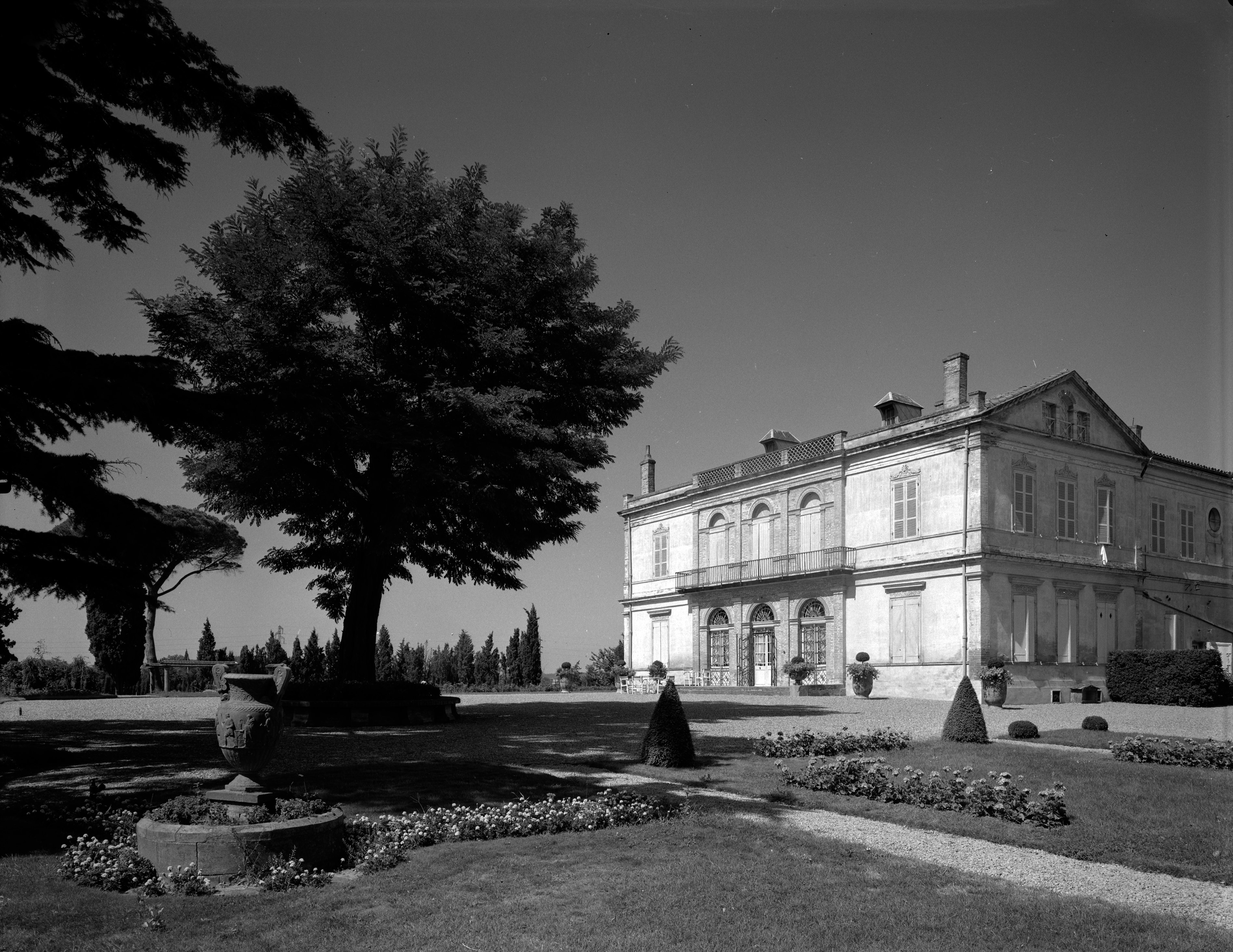 Domaine de la Flambelle, entre l'avenue des Arènes-Romaines et le chemin de la Flambère. Le 4 Août 1964. Vue d'une partie du parc de la propriété et du château.